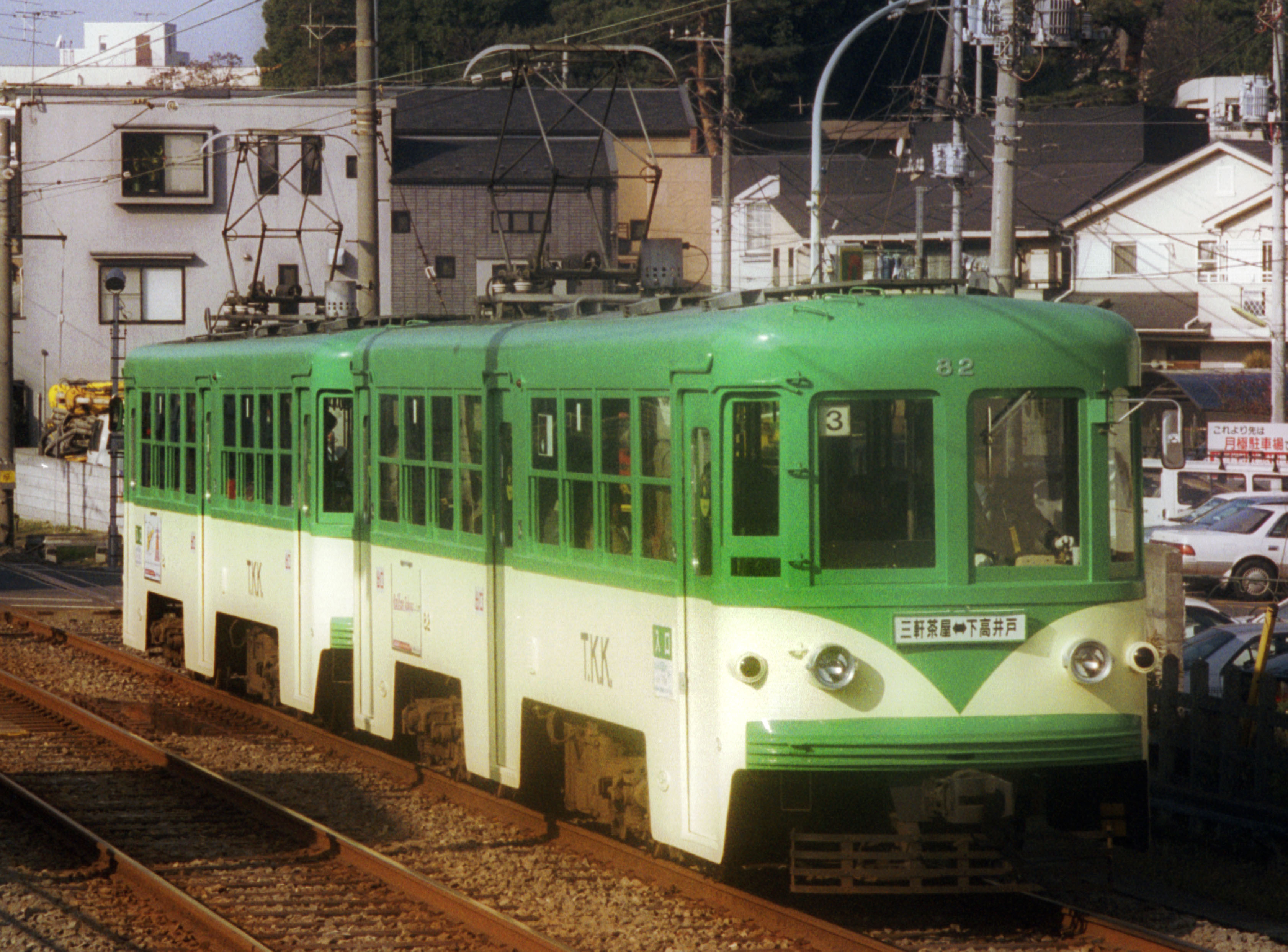 東急80形 デハ82・81号